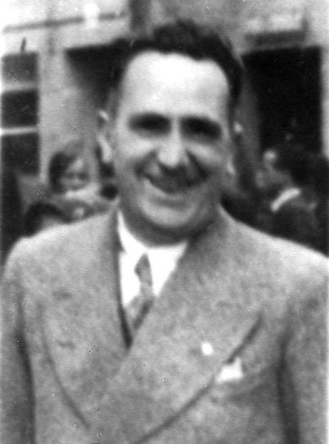 Ánxel Casal, paseando coa súa irmá Maruxa polas rúas de Compostela en maio de 1935